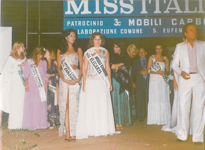 Serata finale Miss ItALIA 1977 alcune Miss con Diana Morini Miss Canzone Italia, Elvira Puglisi Miss Eleganza Italia e il patron Enzo Mirigliani